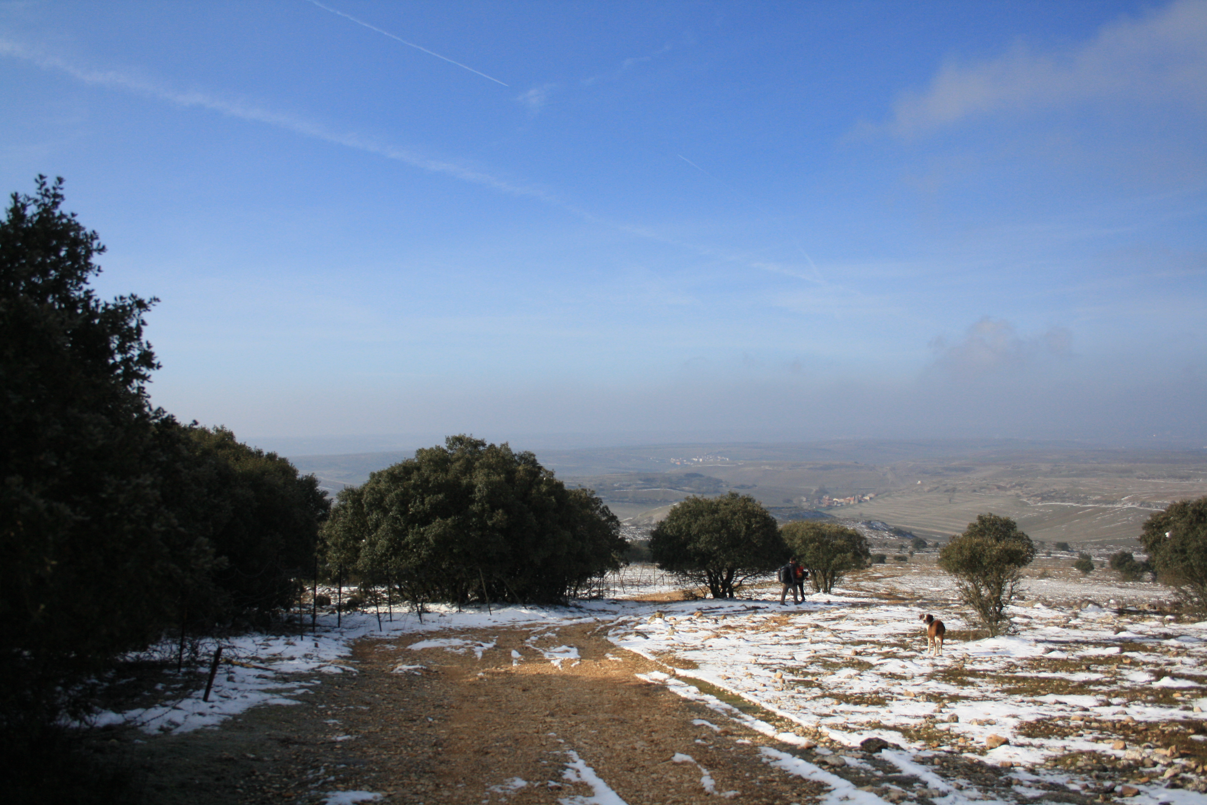 Atapuerca